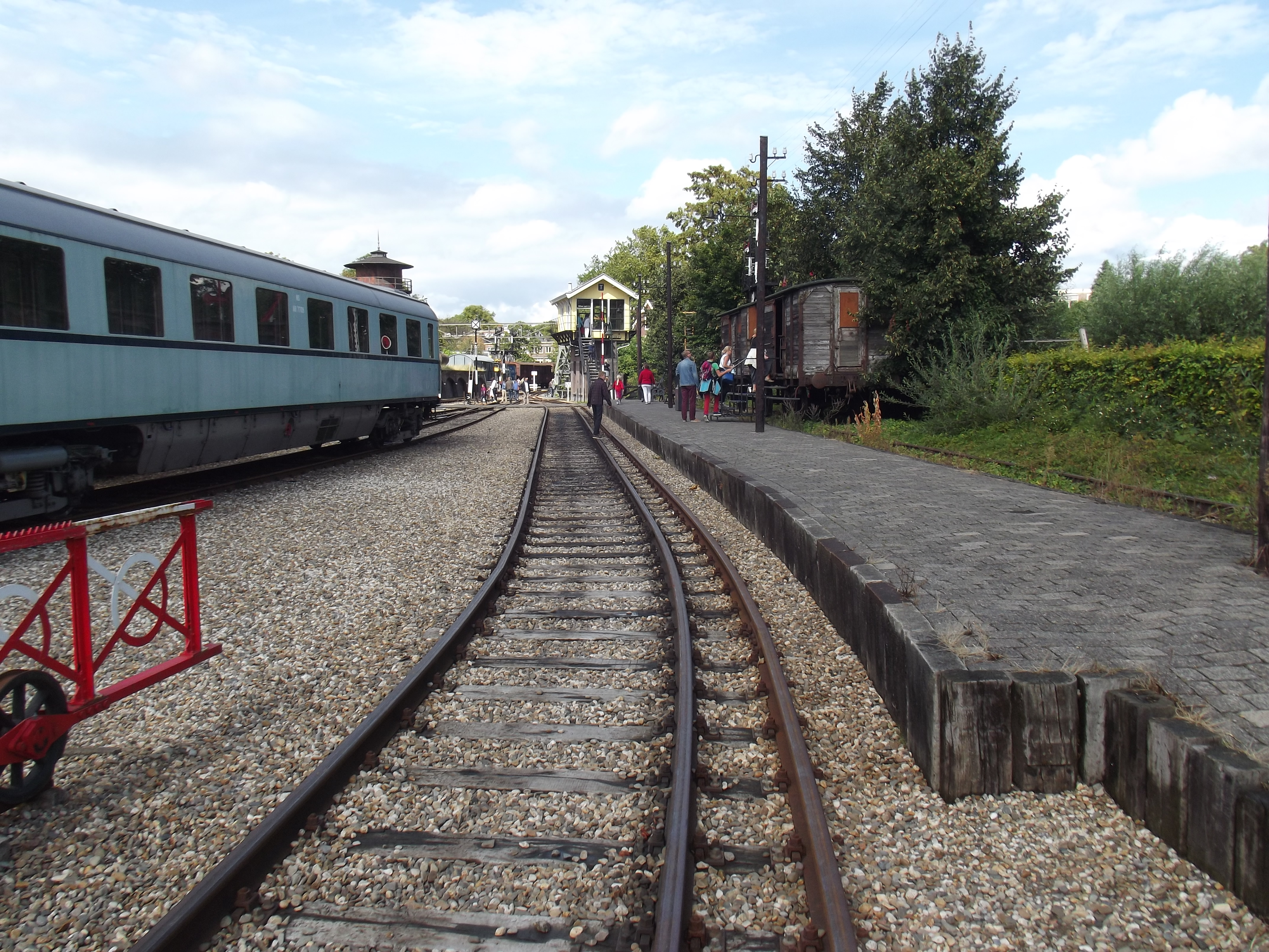 Dierailig spoortraject in het Utrechtse spoormuseum met normaalspoor en 1945 mm breedspoor